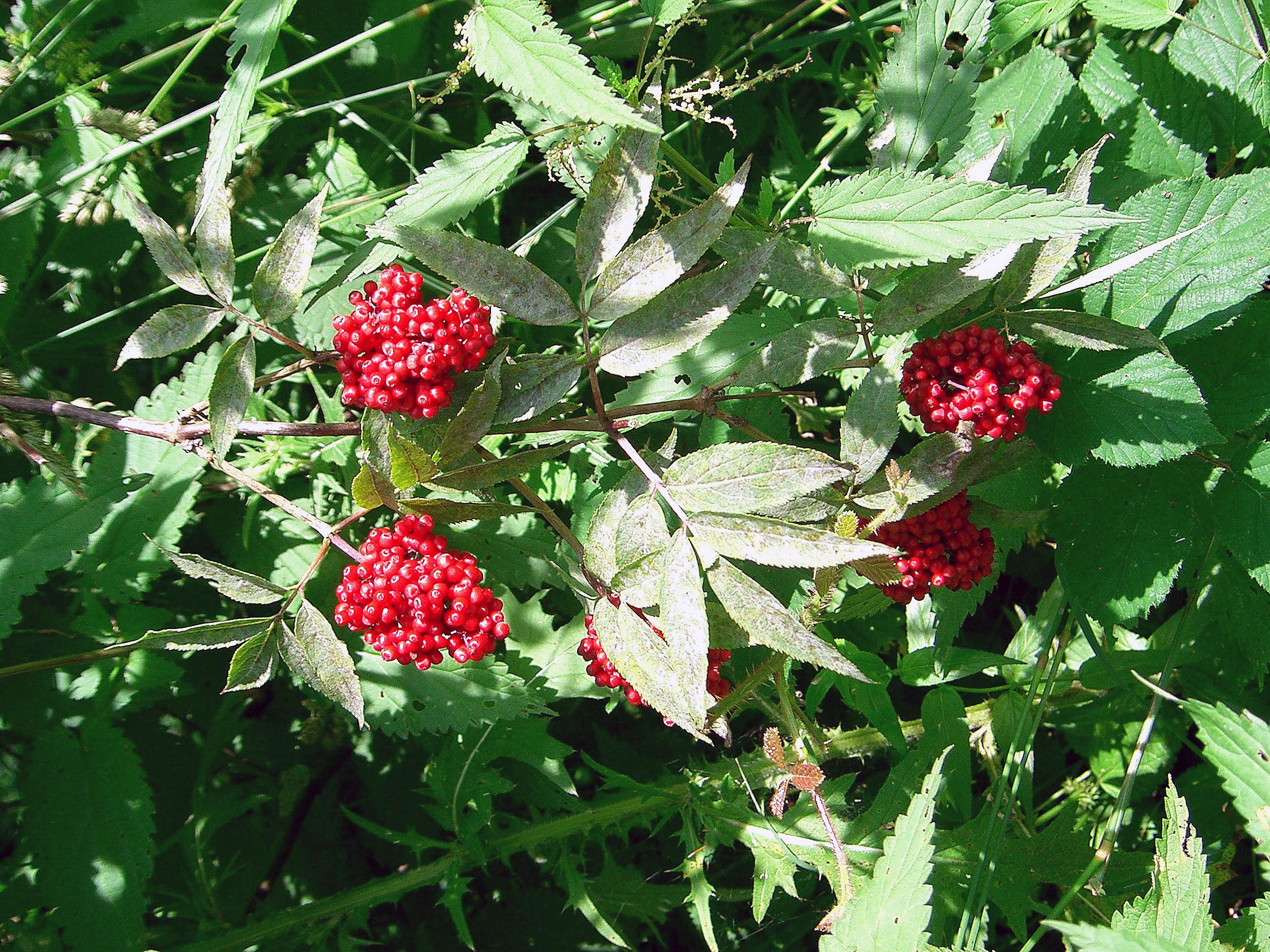 Roter Holunder in Oberösterreich